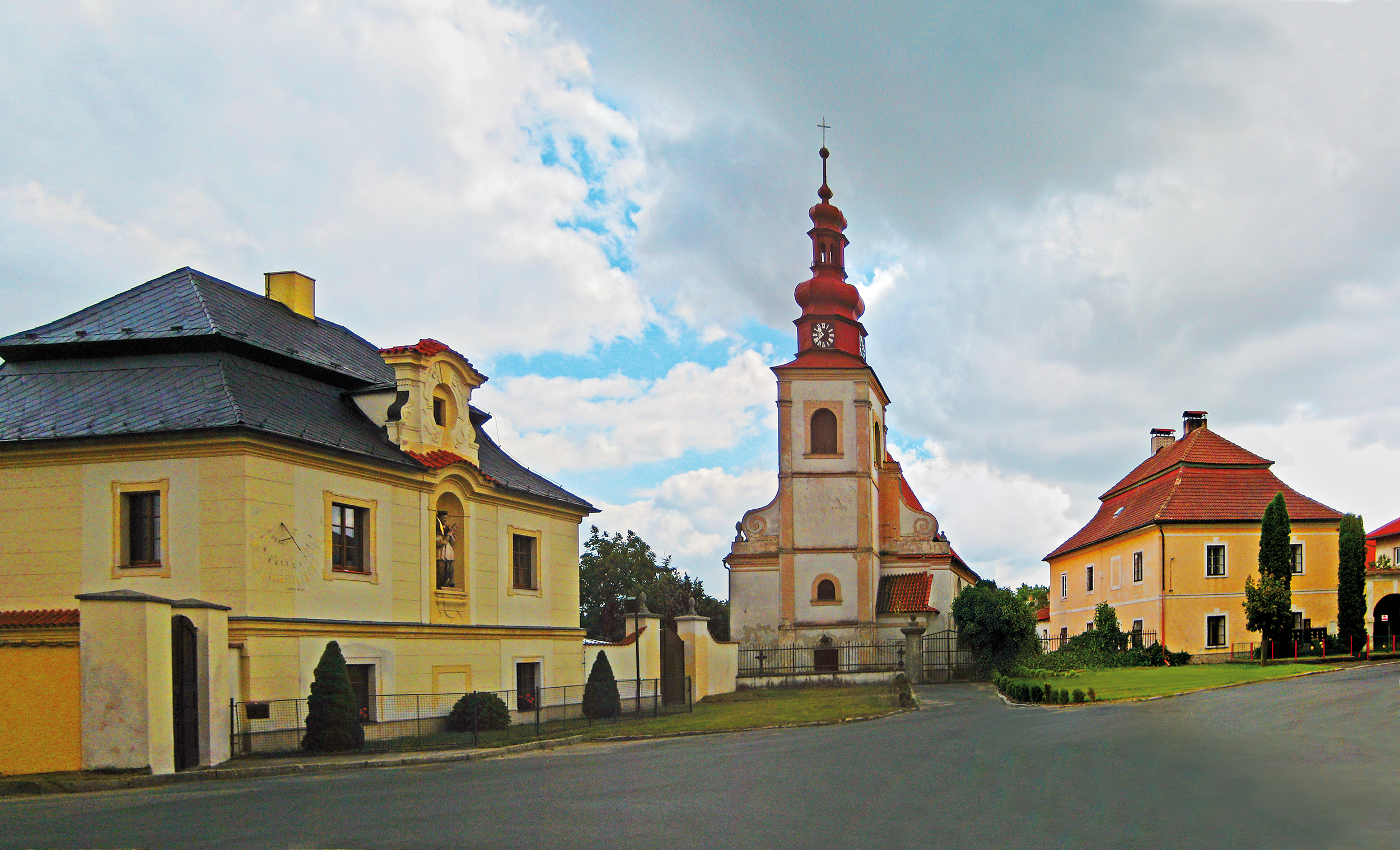 Městys Suchdol, asi 8 km na západ od Kutné Hory, původně gotický kostel svaté Markéty Antiochijské ze 14. století barokně přestavěn, fara